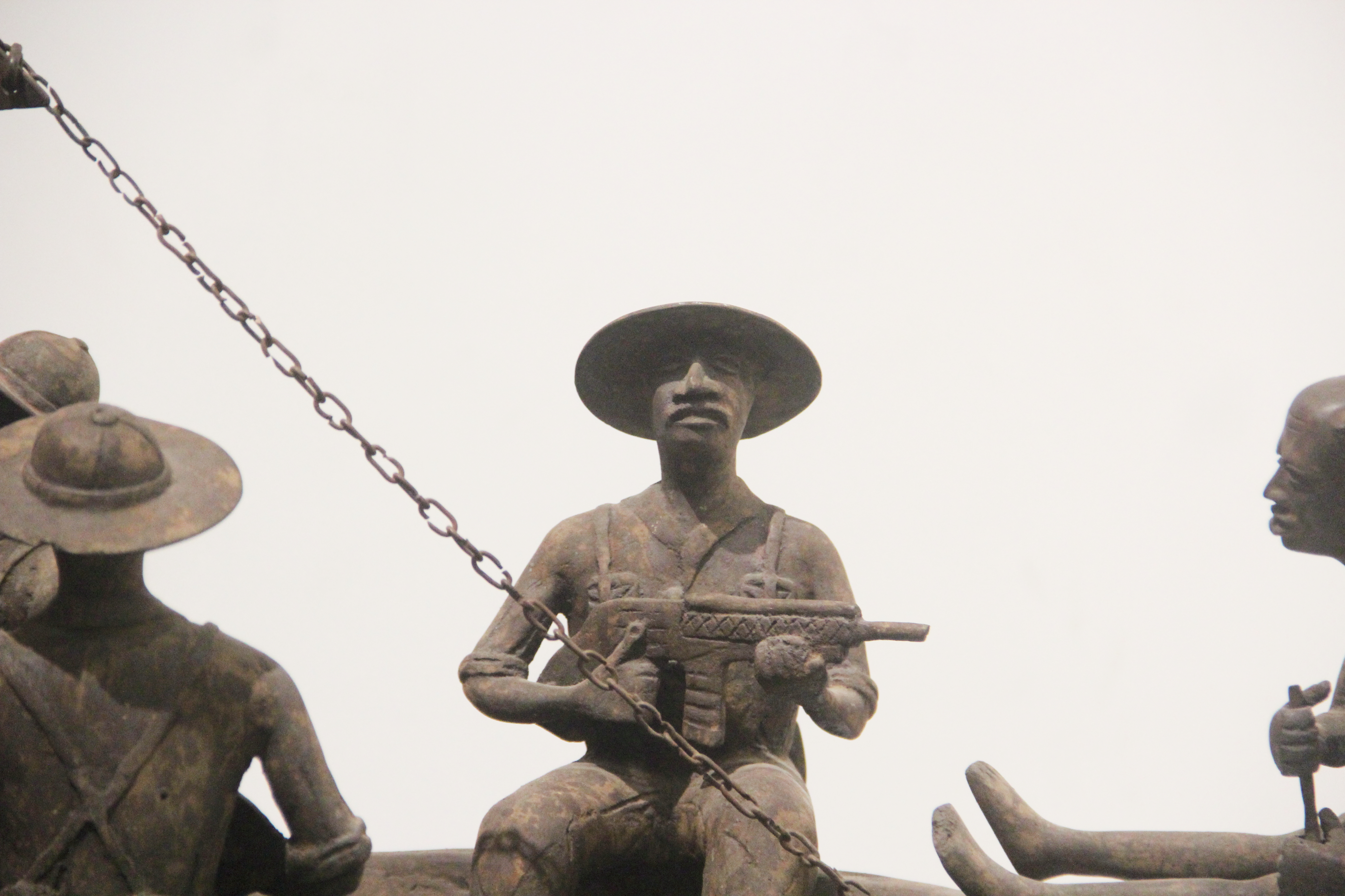 Ovǫnramwęn Nǫgbaisi sur le chemin de l'exil à Calabar. Sculpture exposée au Musée des Civilisations noires de Dakar, Sénégal. This is an image with the theme "Africa on the Move or Transport" from: Senegal